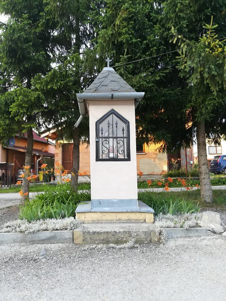 Kaplnka v obci Višňové pri urbárskom dome